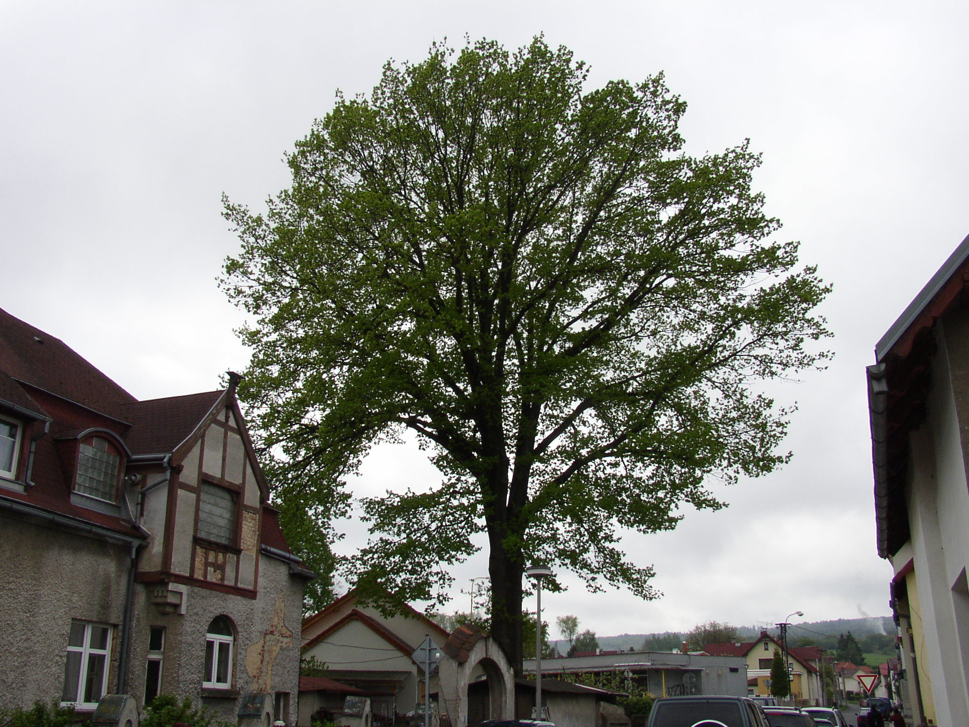 Dub letní, Kostelní ulice, Varnsdorf, okres Děčín, Česká reublika